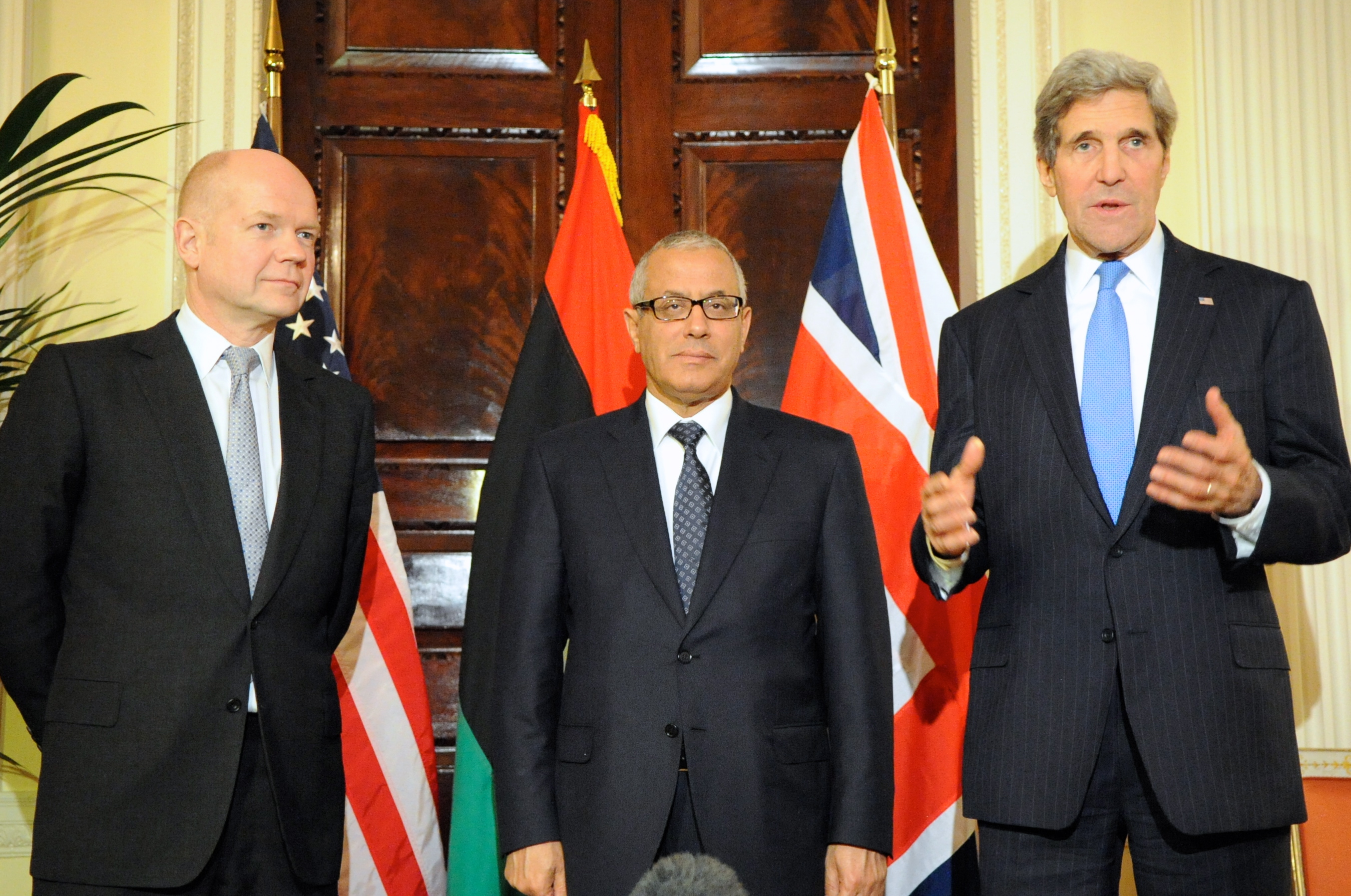 U.S. Secretary of State John Kerry speaks as he is joined by British Foreign Secretary William Hague and Libyan Prime Minister Ali Zeidan following a trilateral meeting in London, United Kingdom, on November 24, 2013. [State Department photo/ Public Domain]